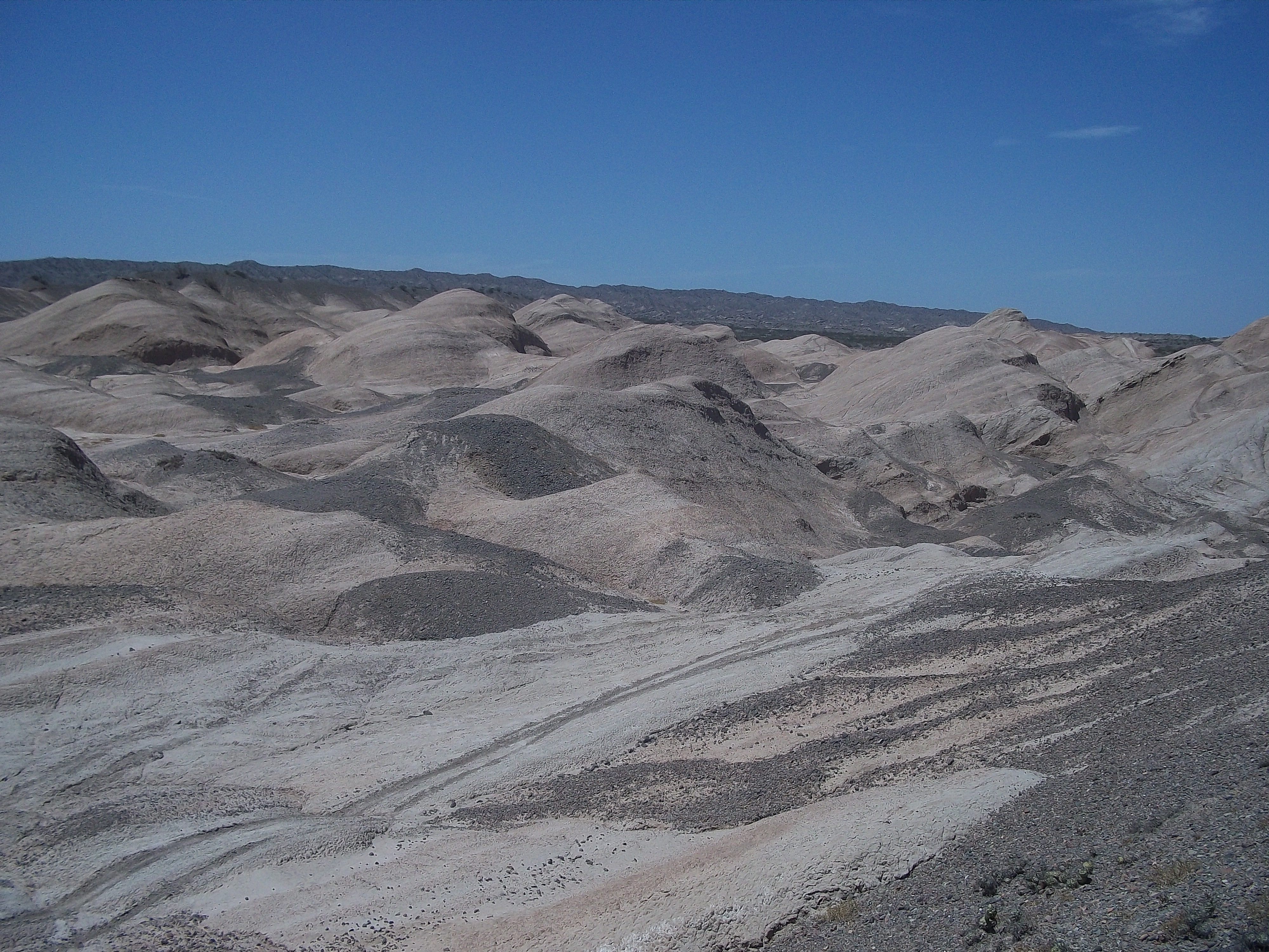 Paisaje protegido Loma de las Tapias, departamento Ullum, provincia de San Juan, Argentina.